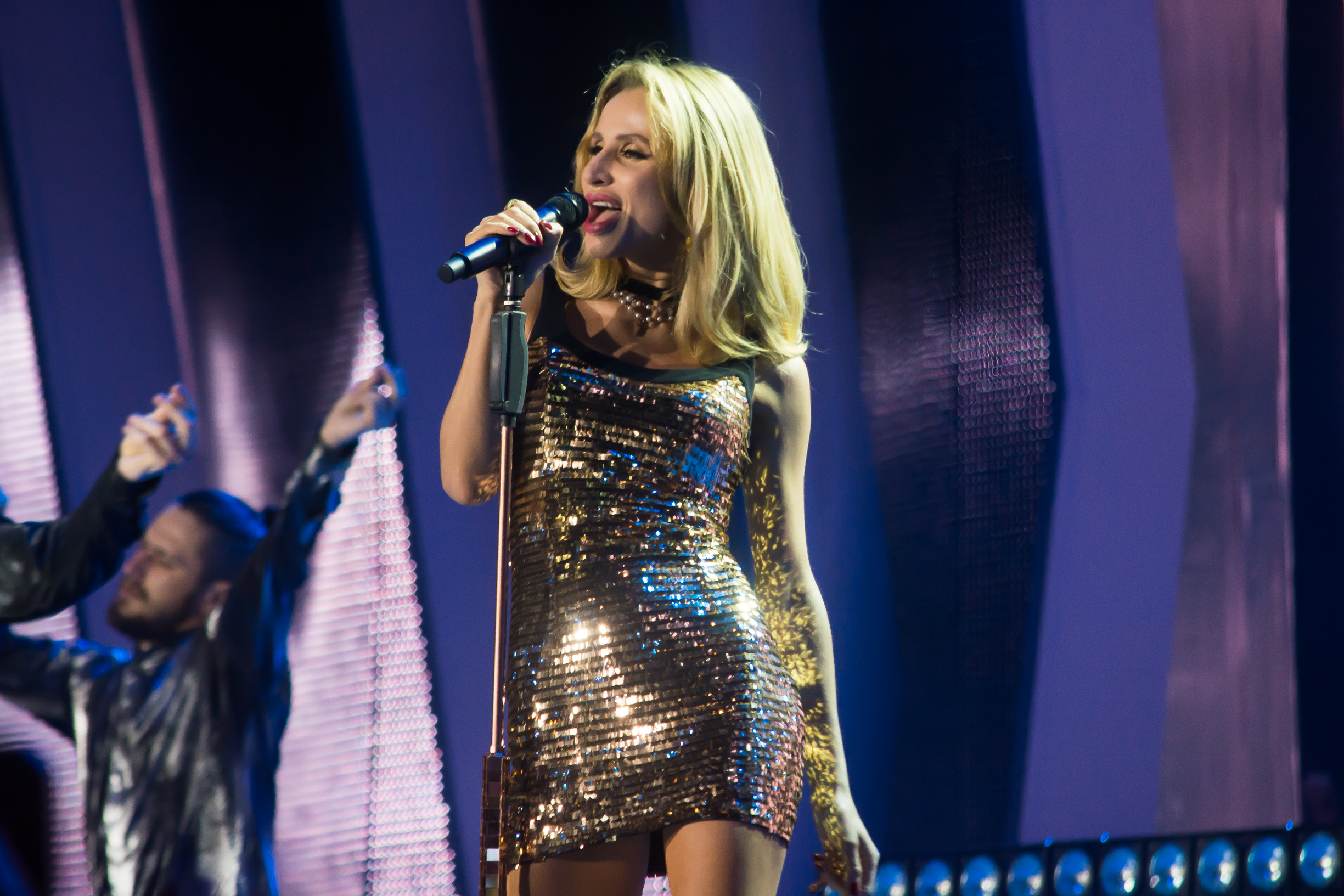 Loboda на Europa Plus TV. Hit Non Stop в Витебске 2016